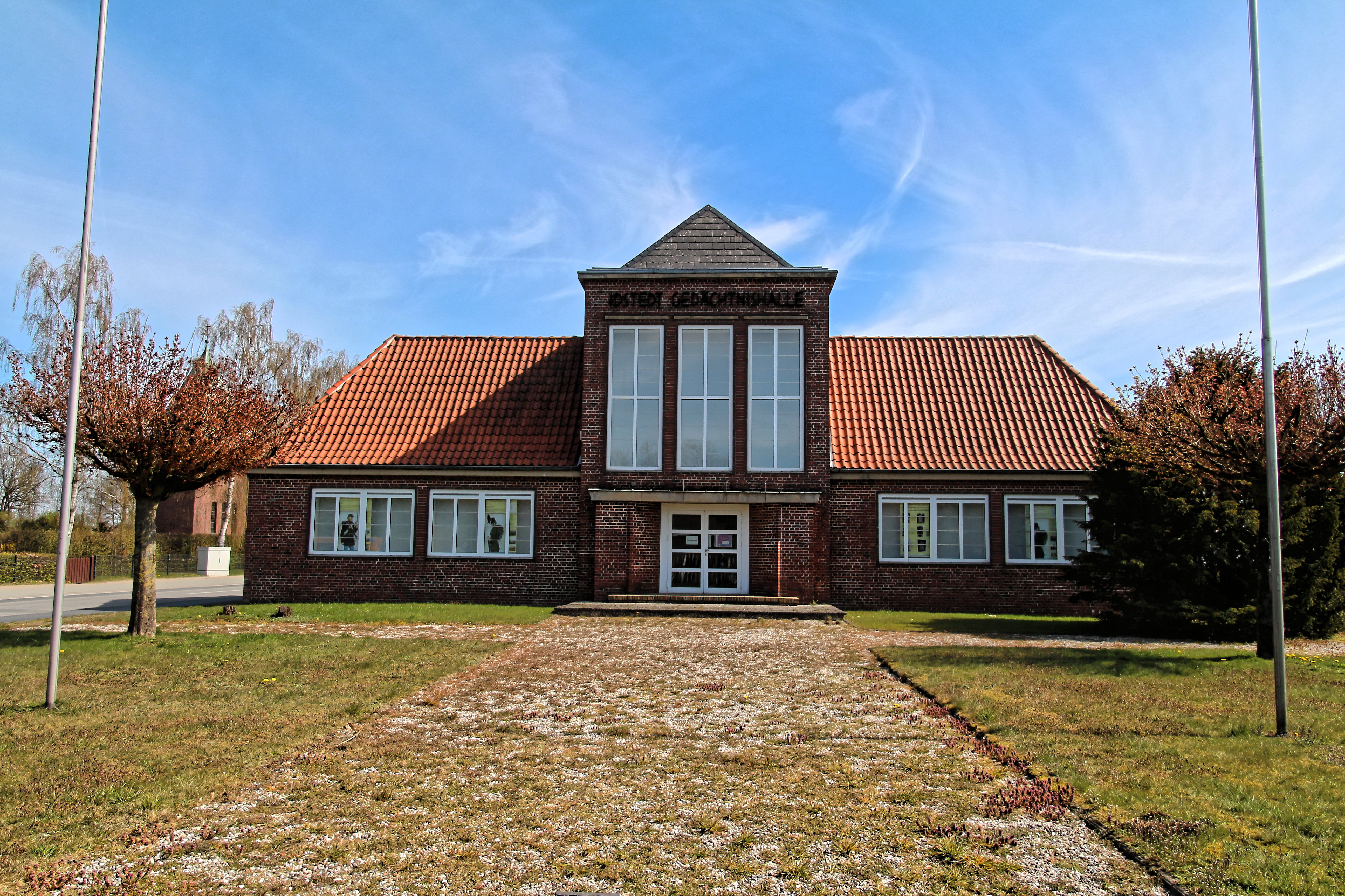 Idstedt, Idstedthalle